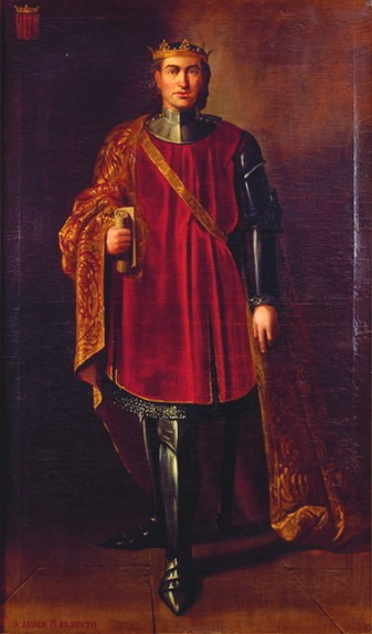 Retrato imaginario del rey Jaime II de Aragón (1267-1327), que fue hijo del rey Pedro III de Aragón y de la reina Constanza II de Sicilia y también hermano y succesor del rey Alfonso III de Aragón.